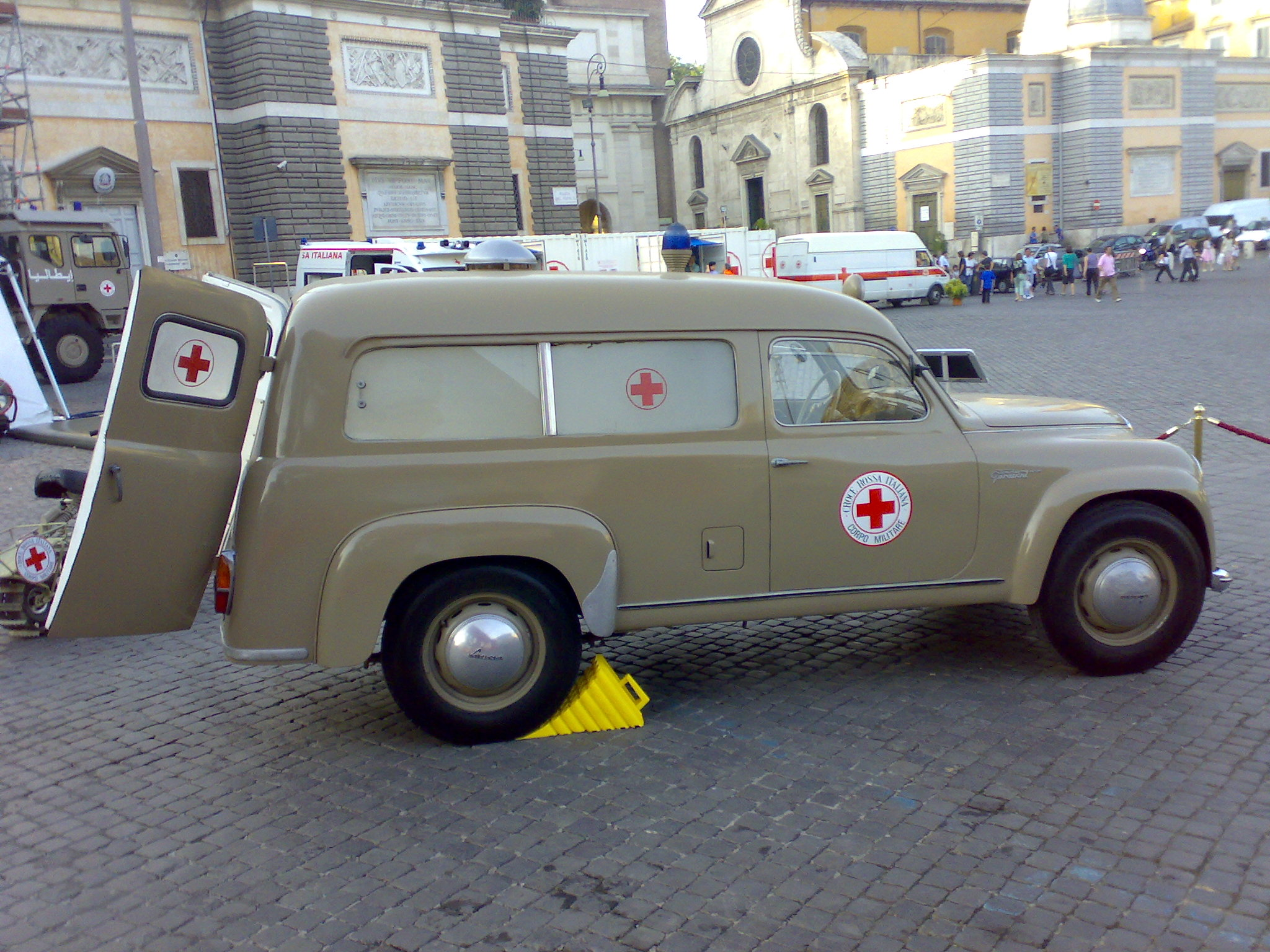 Lancia Appia C86S Autolettiga, guida a sinistra, prodotta dall'aprile 1954 al dicembre 1955 in 18 esemplari. Autoambulanza, usata dalla Croce Rossa Italiana.